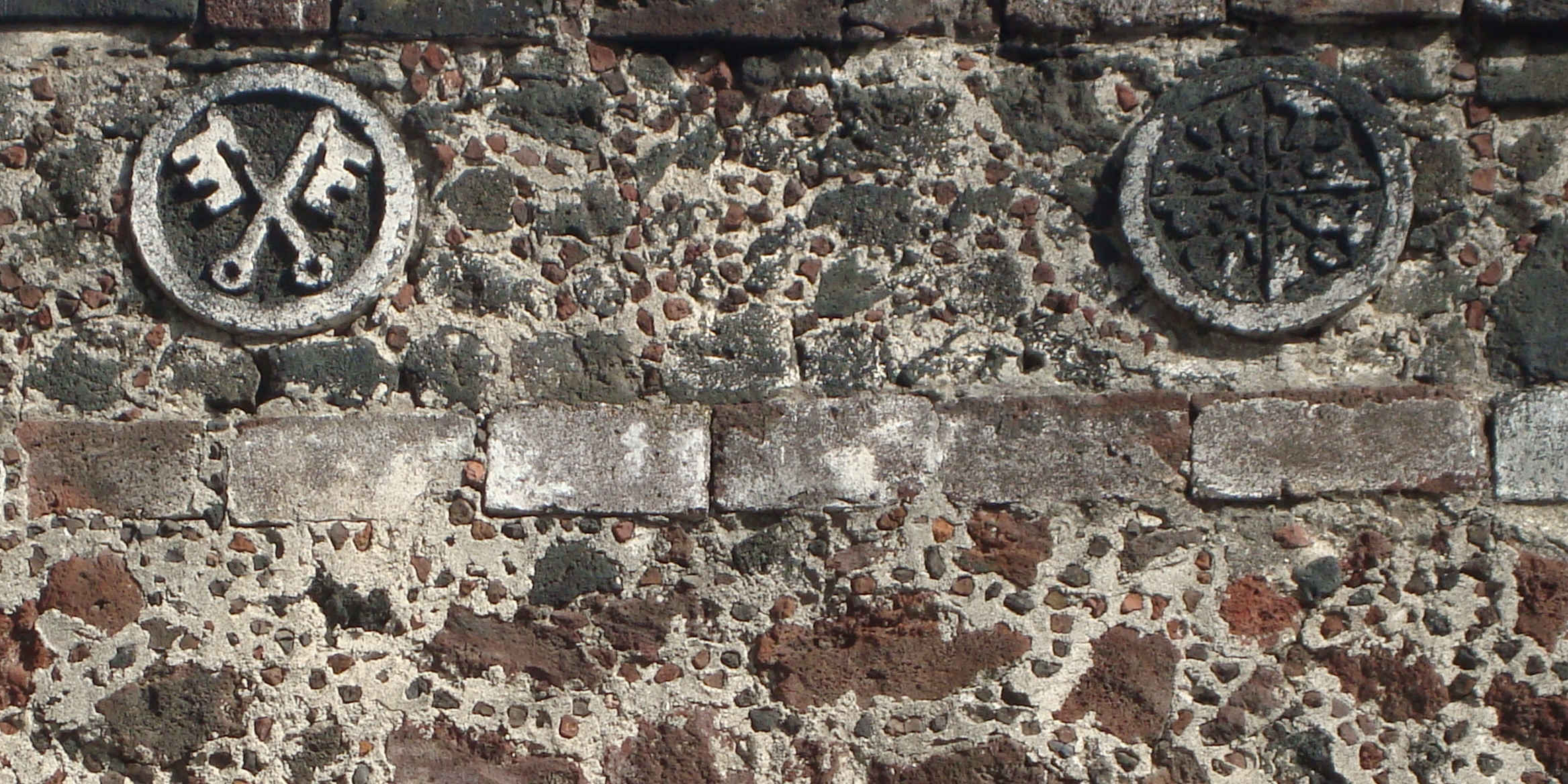 Representación de los símbolos de san Pedro Apóstol y santo Domingo de Guzmán (las llaves y la cruz dominica) en los muros del templo y exconvento de San Pedro Apóstol en Tláhuac (D. F.).